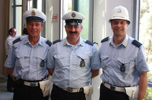 Polizia municipale di Rende